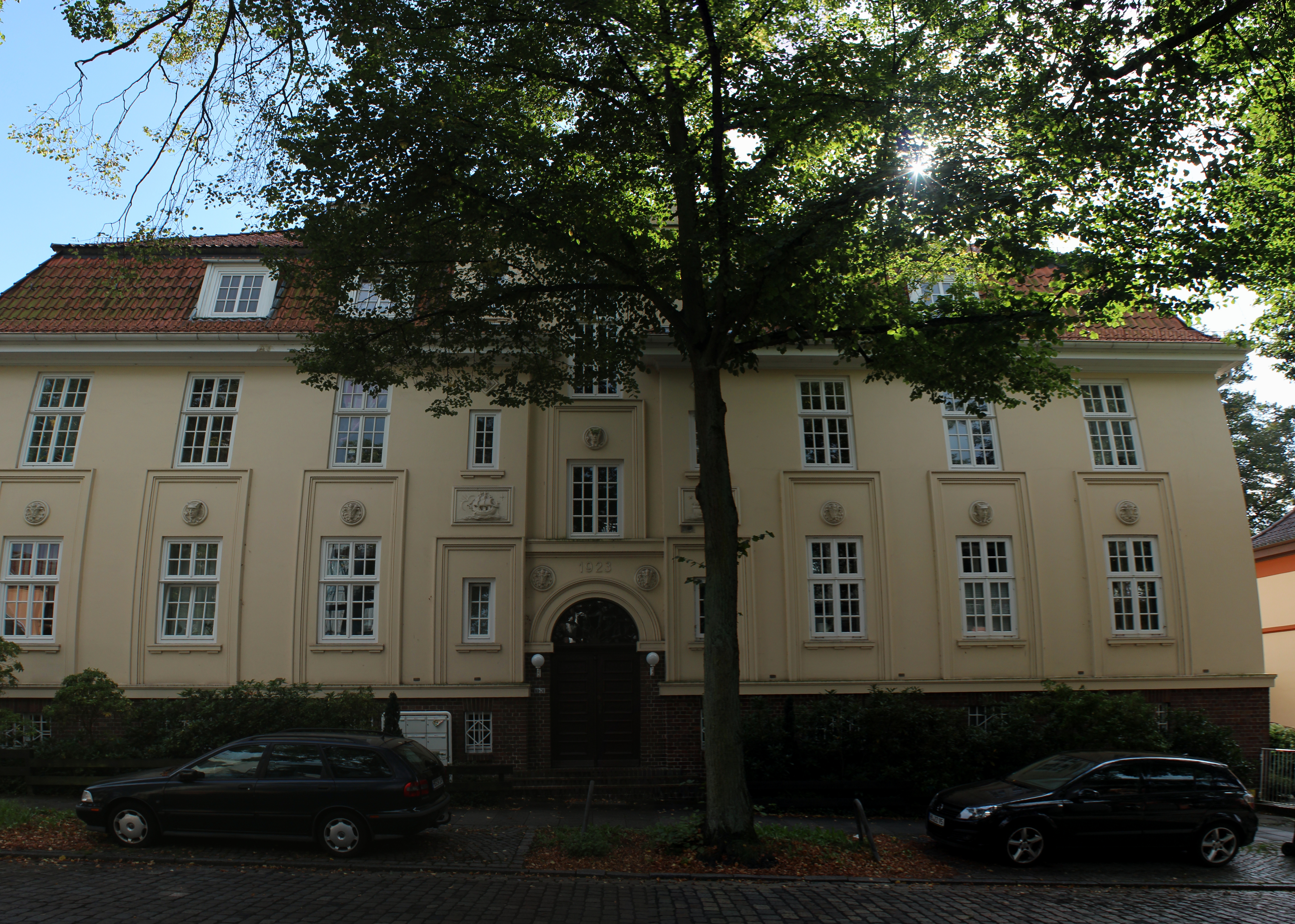 Werkswohnhaus in Bremen, Weserstraße 69, 70.Das abgebildete Objekt ist ein geschütztes Kulturdenkmal in der Freien Hansestadt Bremen, mit der Nr. 1333 beim Landesamt für Denkmalpflege registriert.